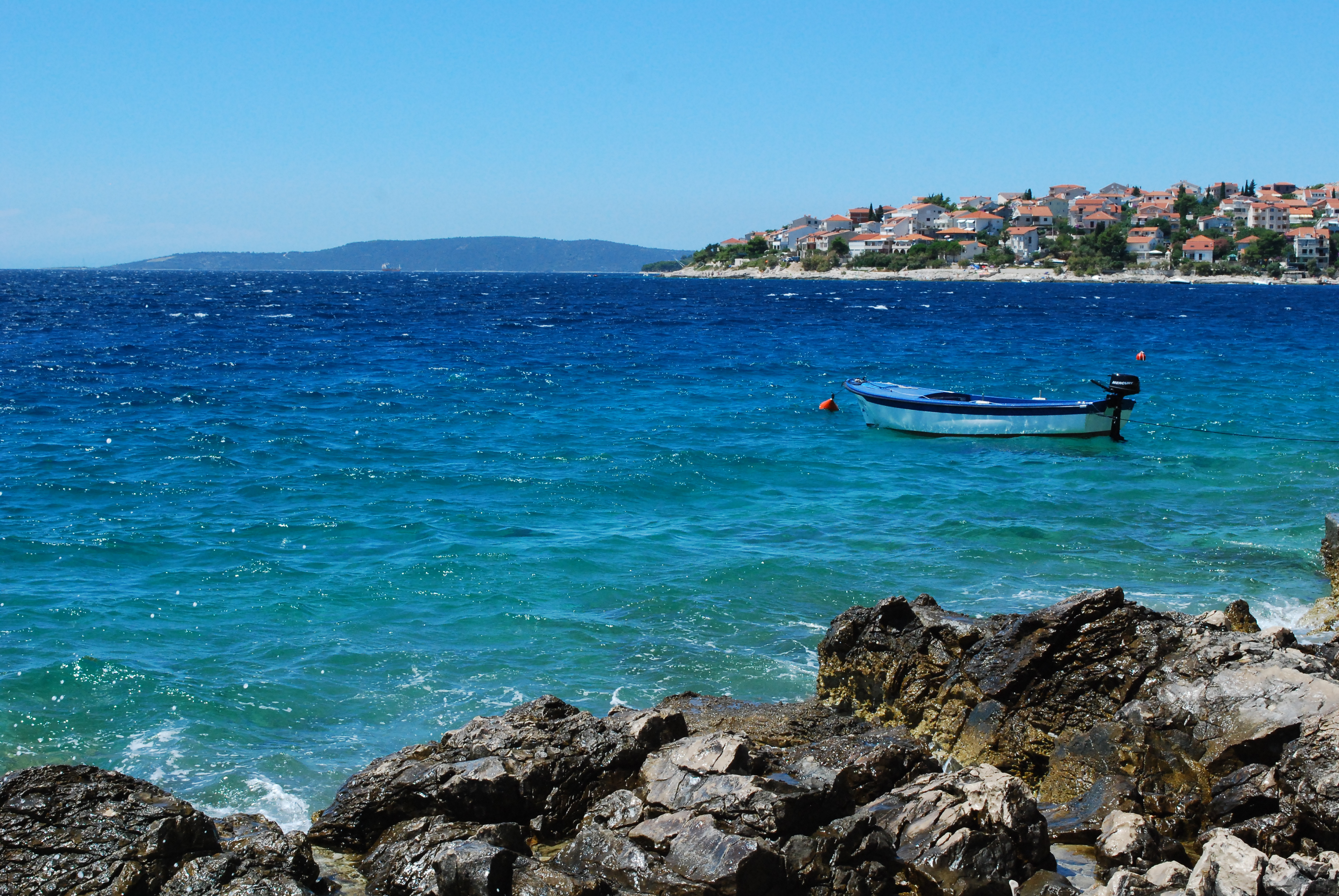 Okrug Gornji, Croatia